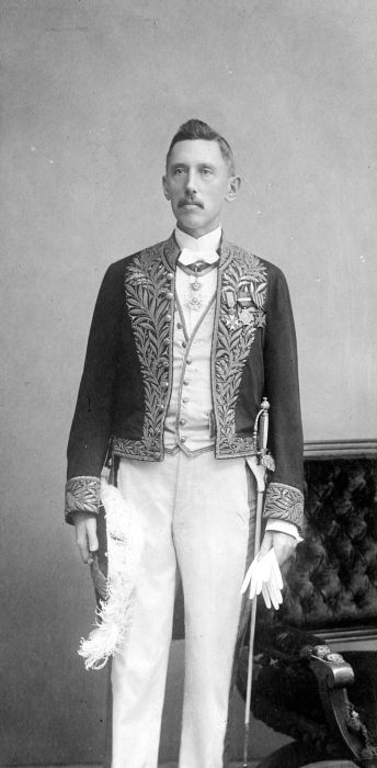 Repronegatief. Portret van F.A. Liefrinck